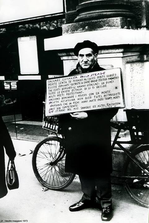 Carlo Torrighelli (C.T.) coi suoi cartelli